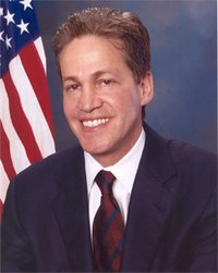 de